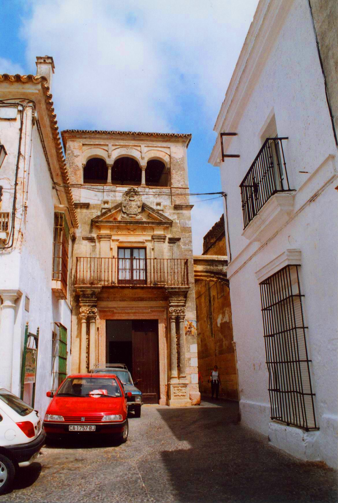 Ciudad de Arcos de la Frontera